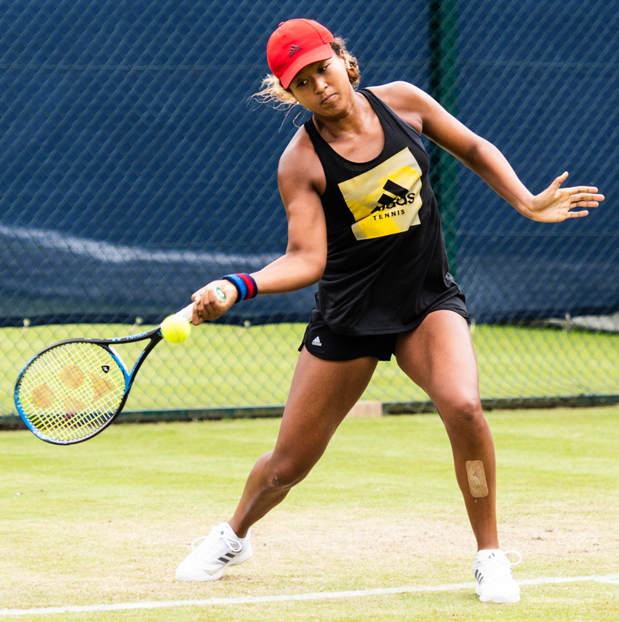 Naomi Osaka